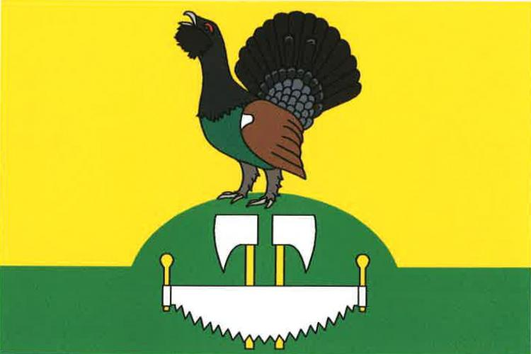 Vlajka, Obecnice, okres Příbram